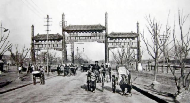 1906年，东长安街上